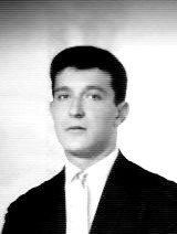 Foto de 1965.